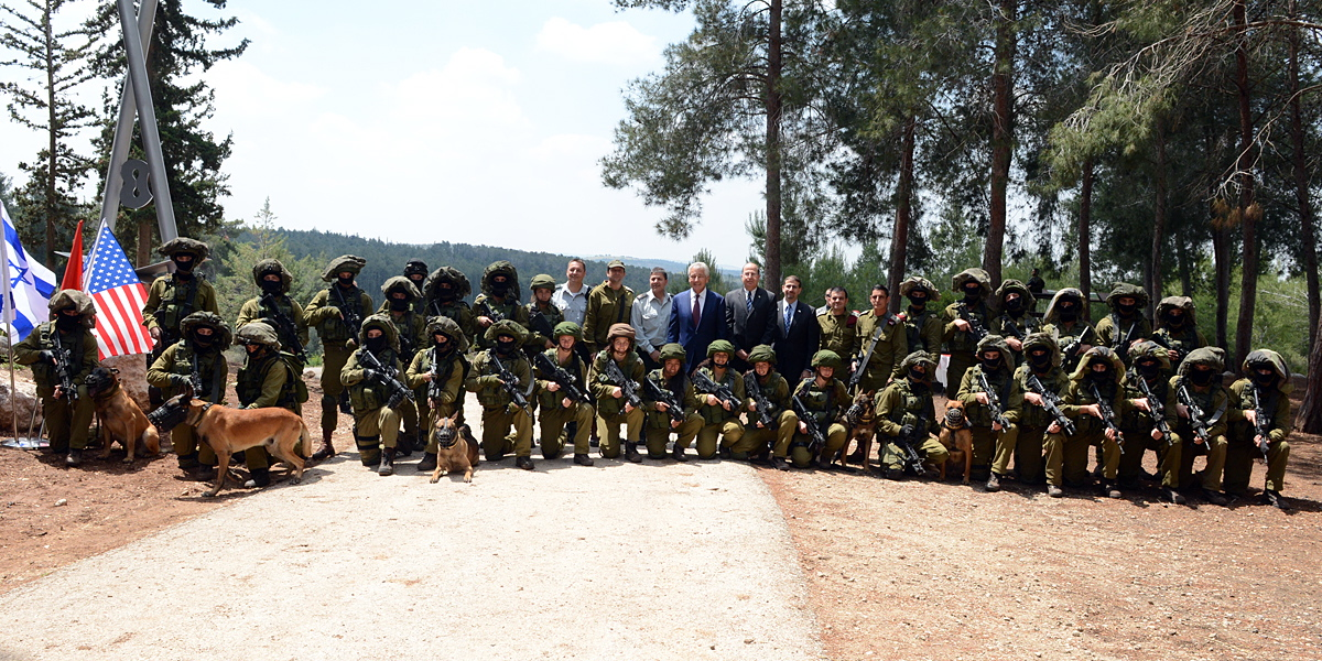 DSC_4045Oketz